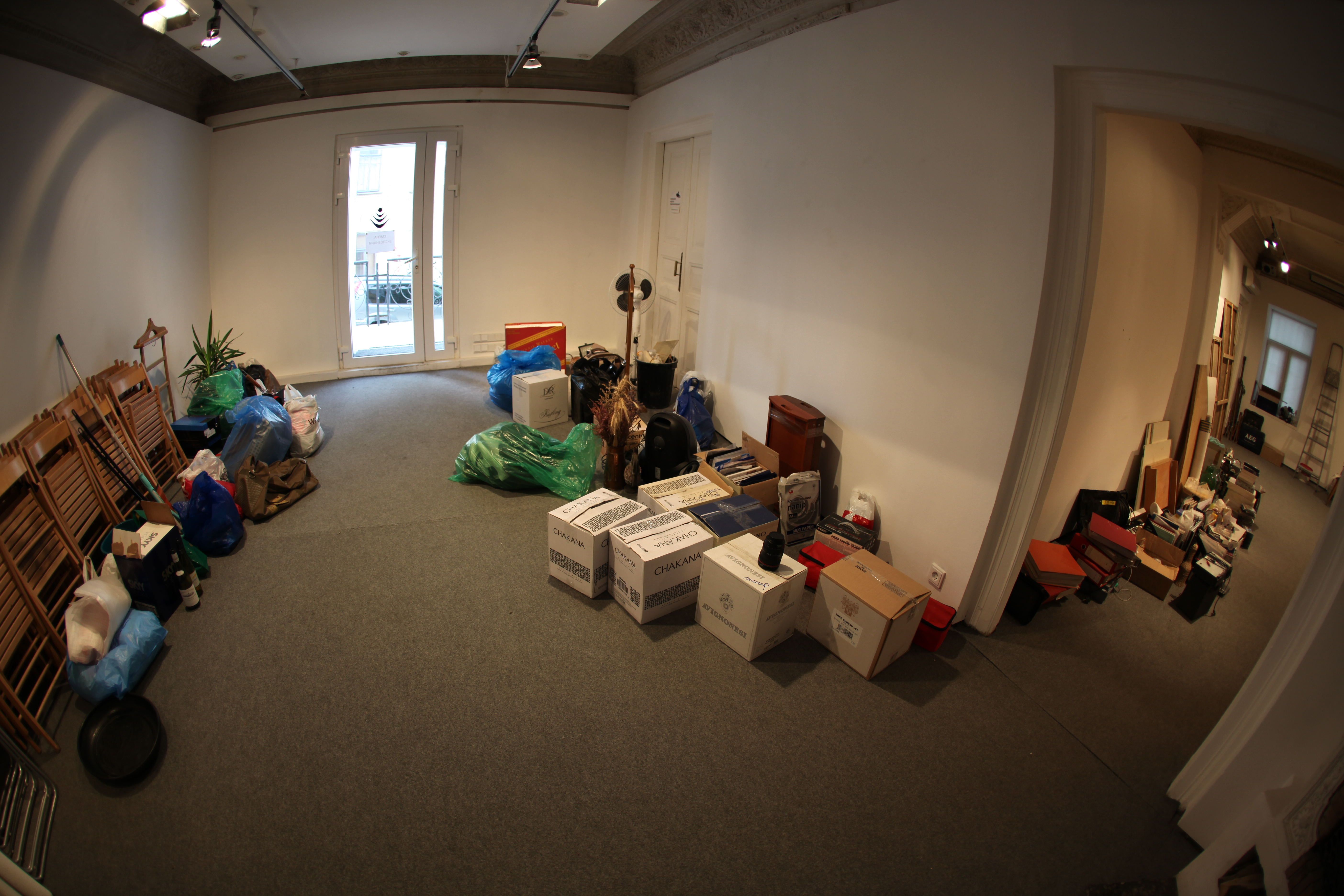 Закрита виставка "Переїзд", 2010